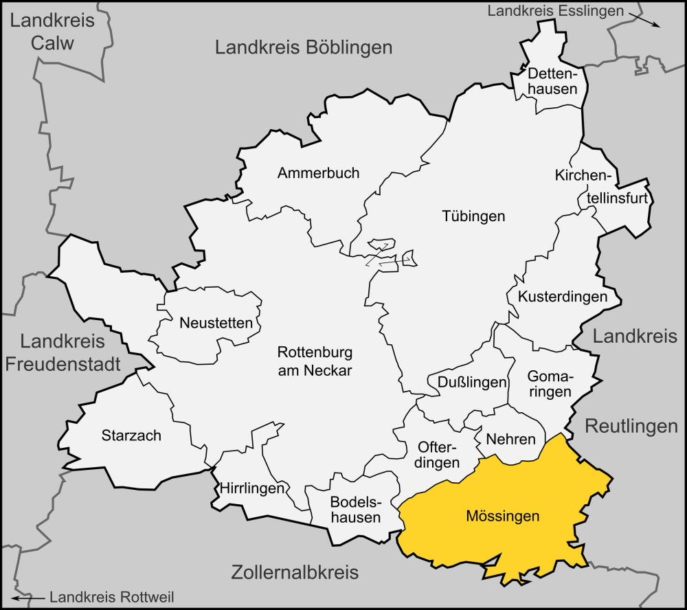 Karte der Stadt Mössingen im Landkreis Tübingen